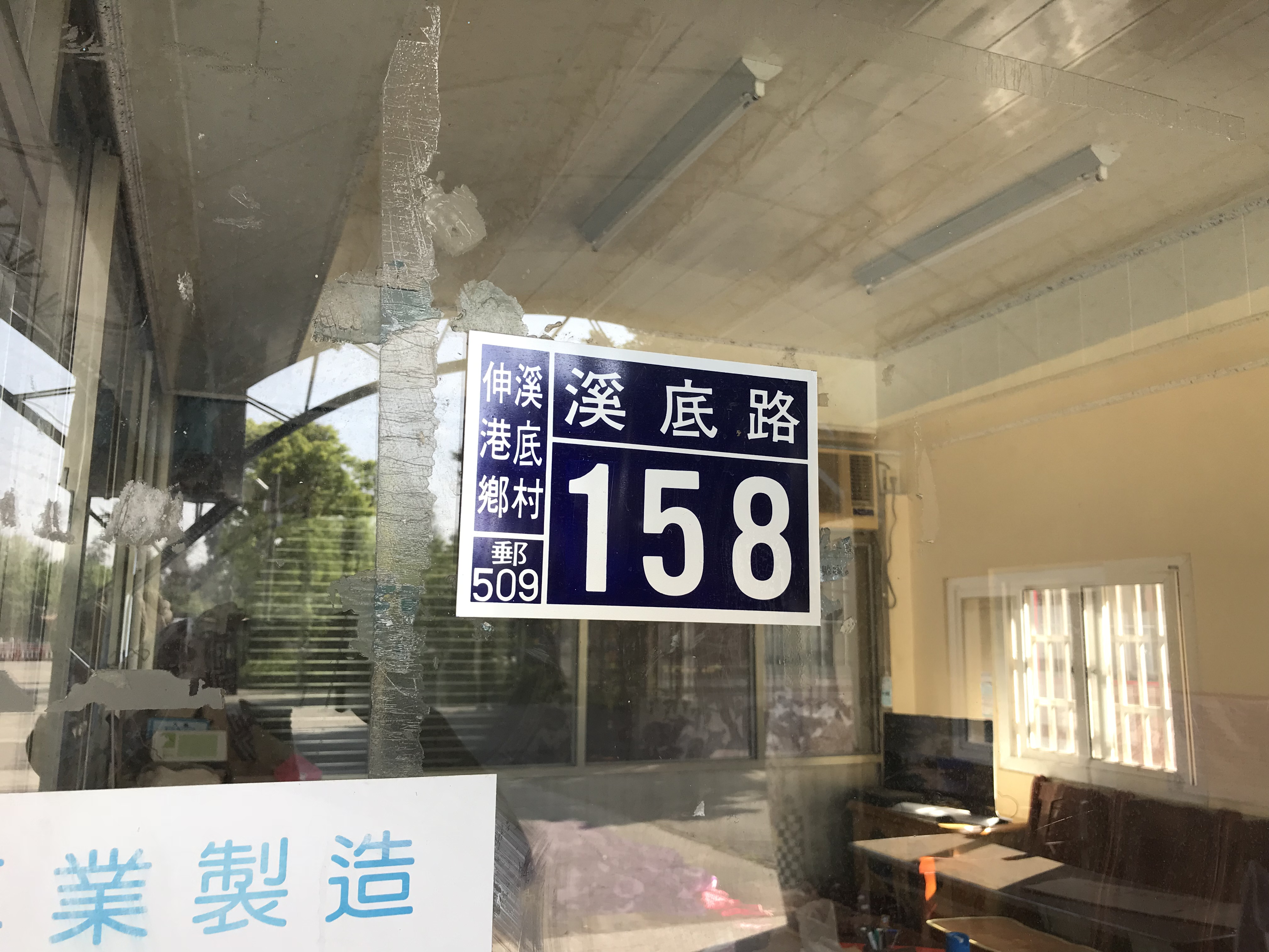 伸慶宮門牌